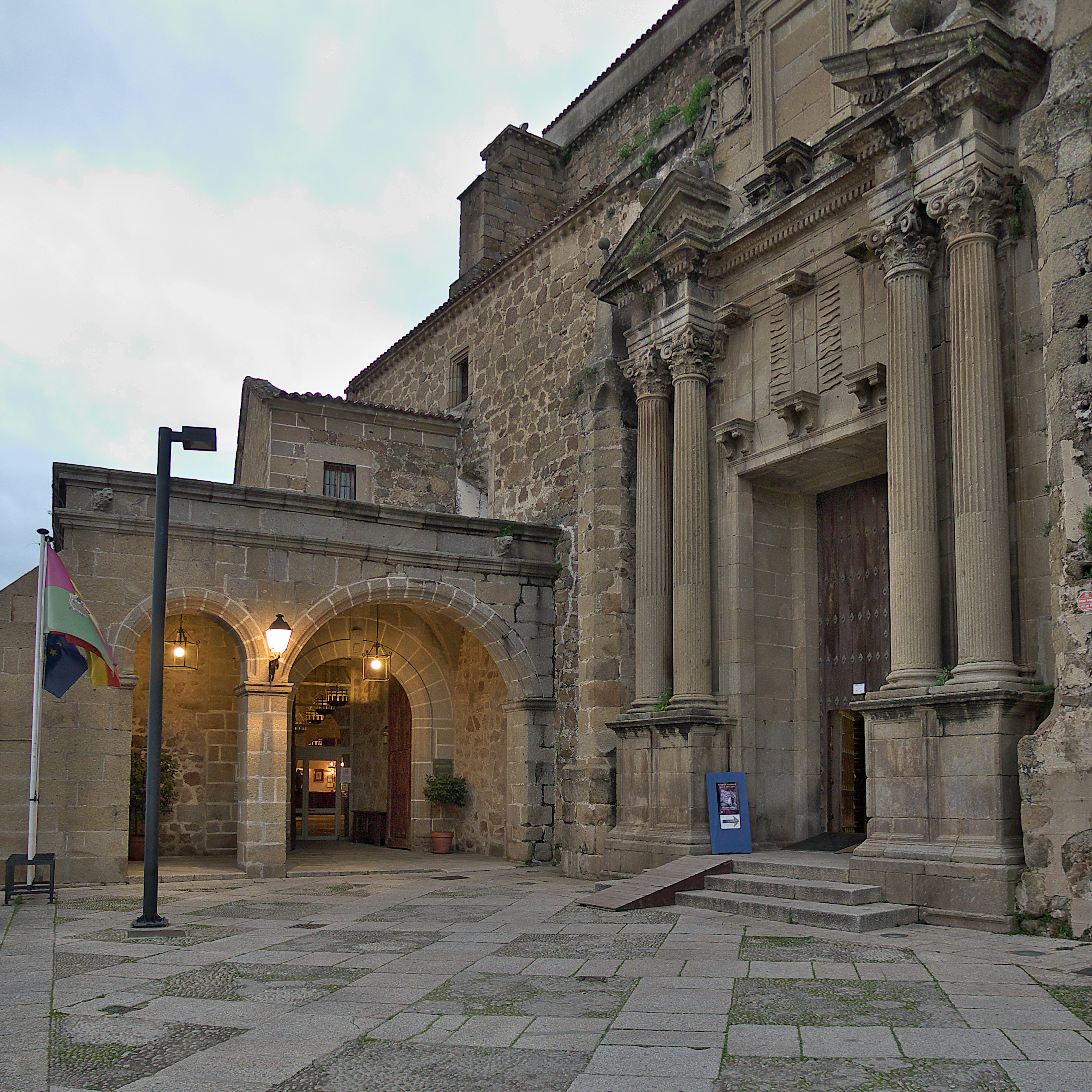 Doña Leonor de Pimentel y Zúñiga, duquesa de Plasencia, promueve la construcción de un convento para la Orden de Predicadores (1477-1484), siendo directores del proyecto los canteros Pedro González, y su hijo Francisco.